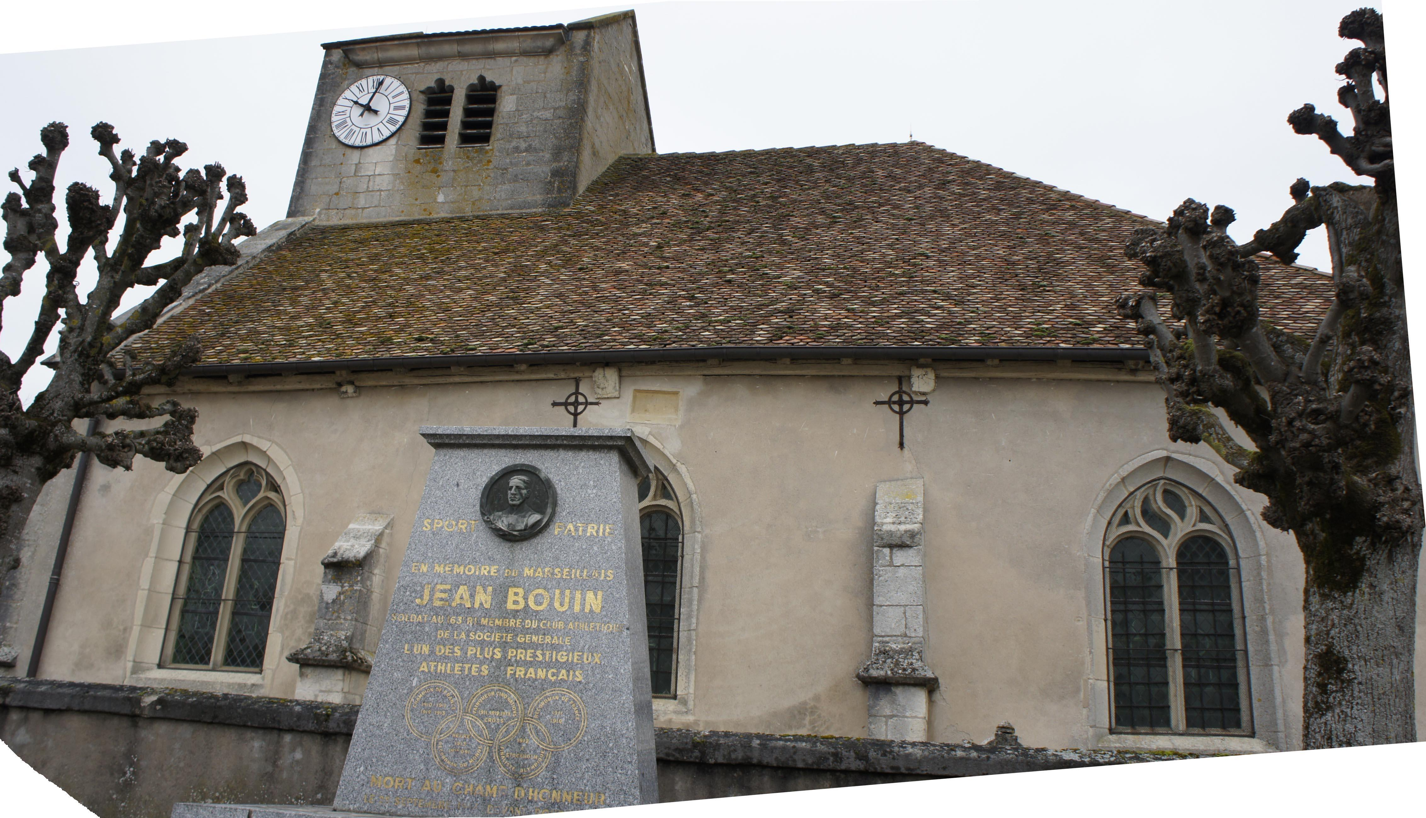 Vue de la stèle à Jean Bouin qui se trouve devant l'église de Bouconville.